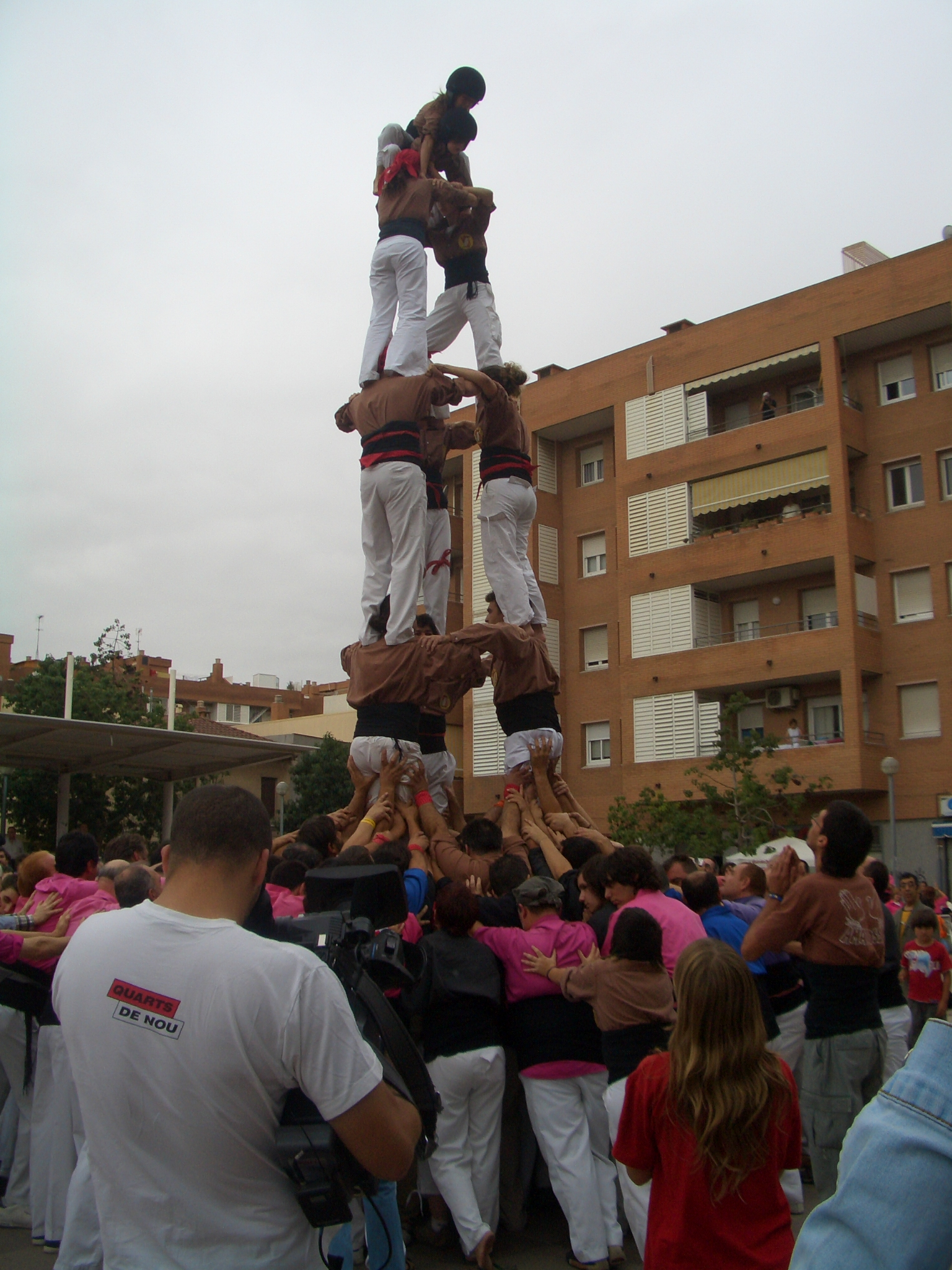 Colla Castellera Matossers de Molins de Rei